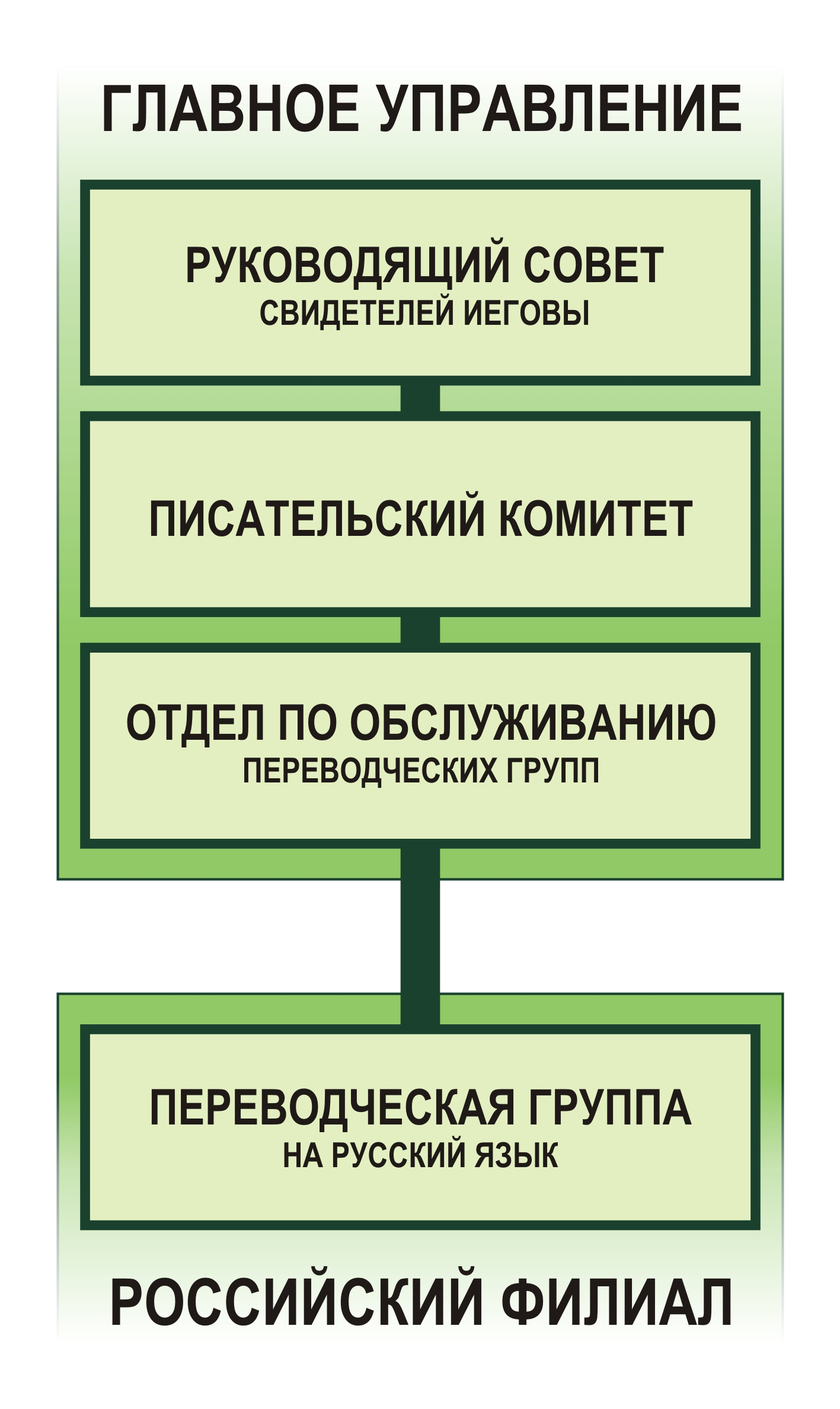 Организация подготовки издания "Священное Писание - Перевод нового мира"